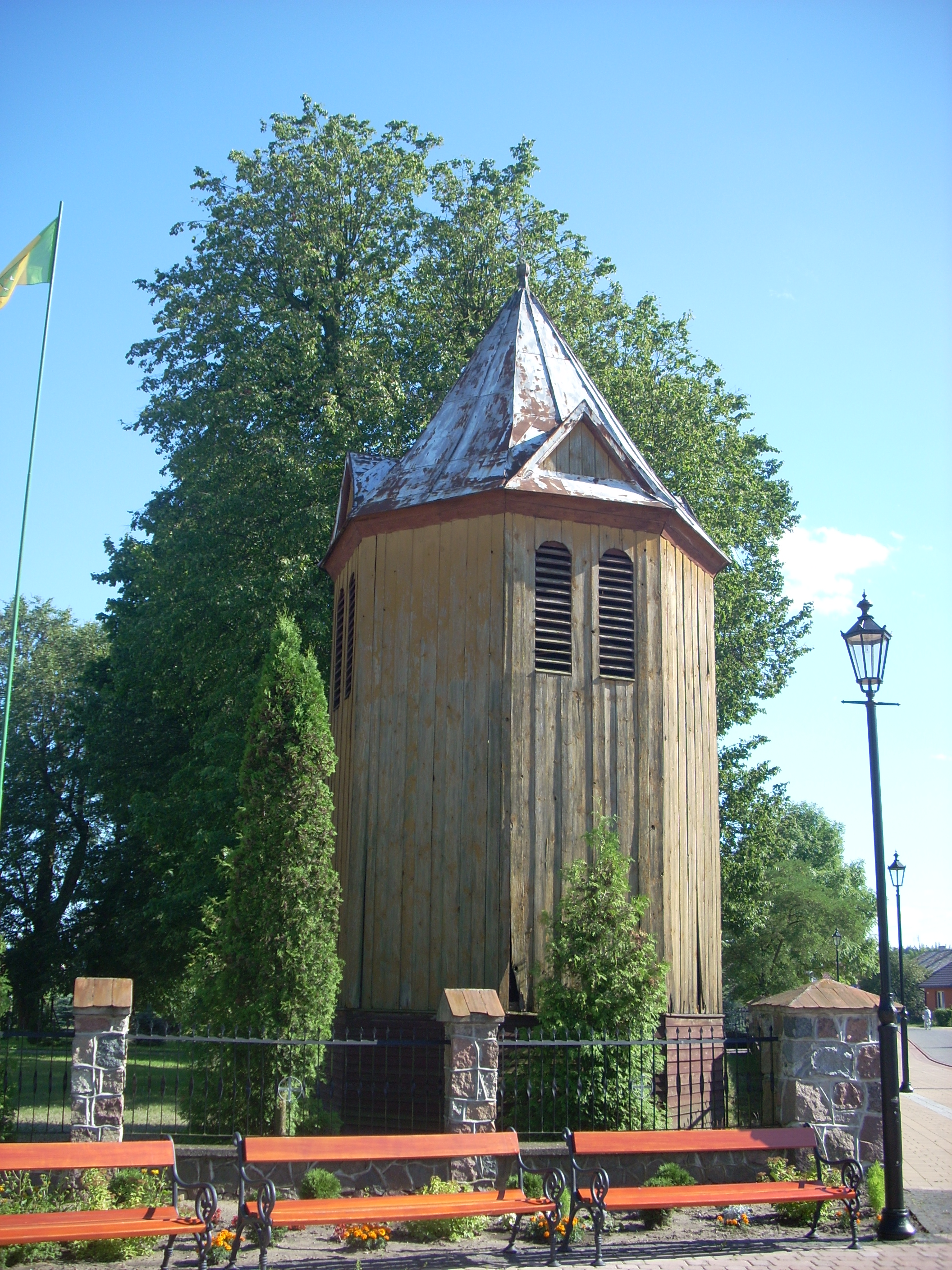 Zabytkowa dzwonnica przy kościele w Jednorożcu - jedyna część kompleksu kościoła, która przetrwała zniszczenie wsi podczas walk w 1915 r.